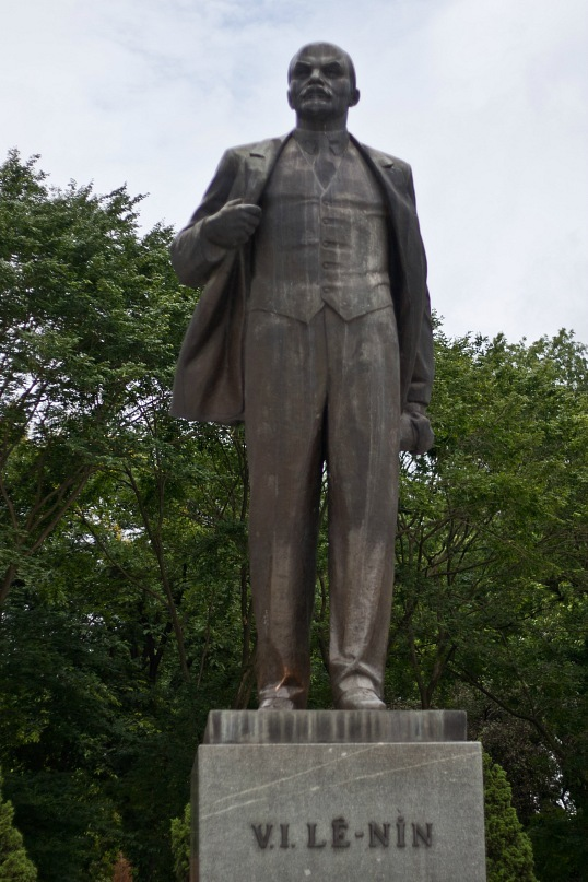 Памятник Ленину в Ханое